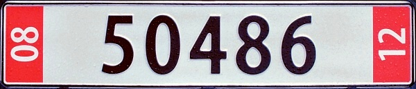 Skilt for turister